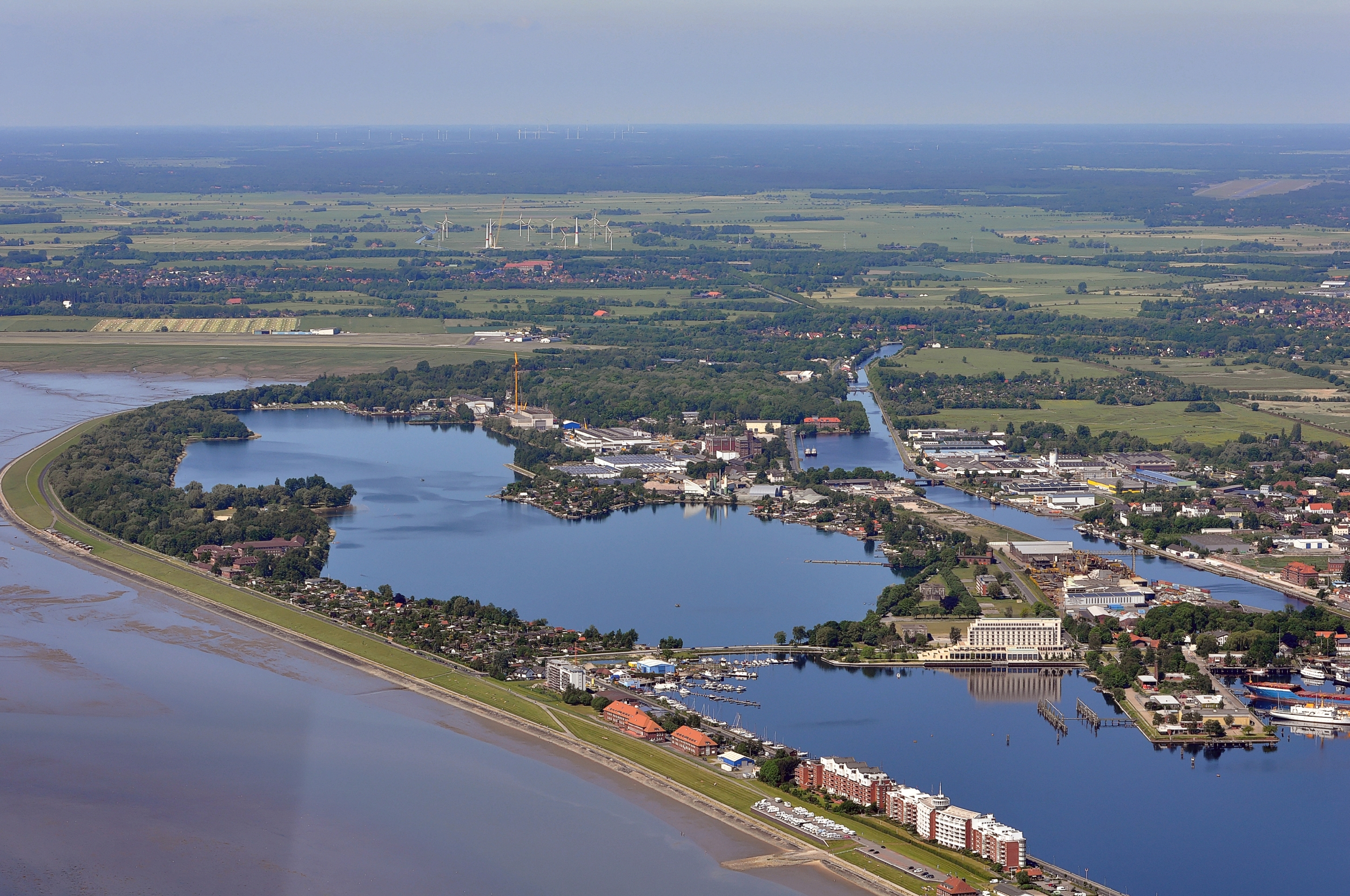 In der Bildmitte der Banter See, rechts Davon der Ems-Jade-Kanal. Im Hintergrund der Flugplatz JadeWeserAirport. Aus der Serie: Luftbilder von der Nordseeküste 2012-05